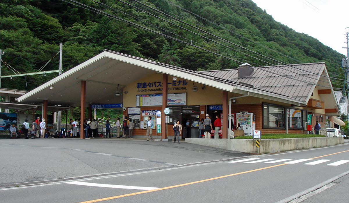 2006年当時の新島々駅